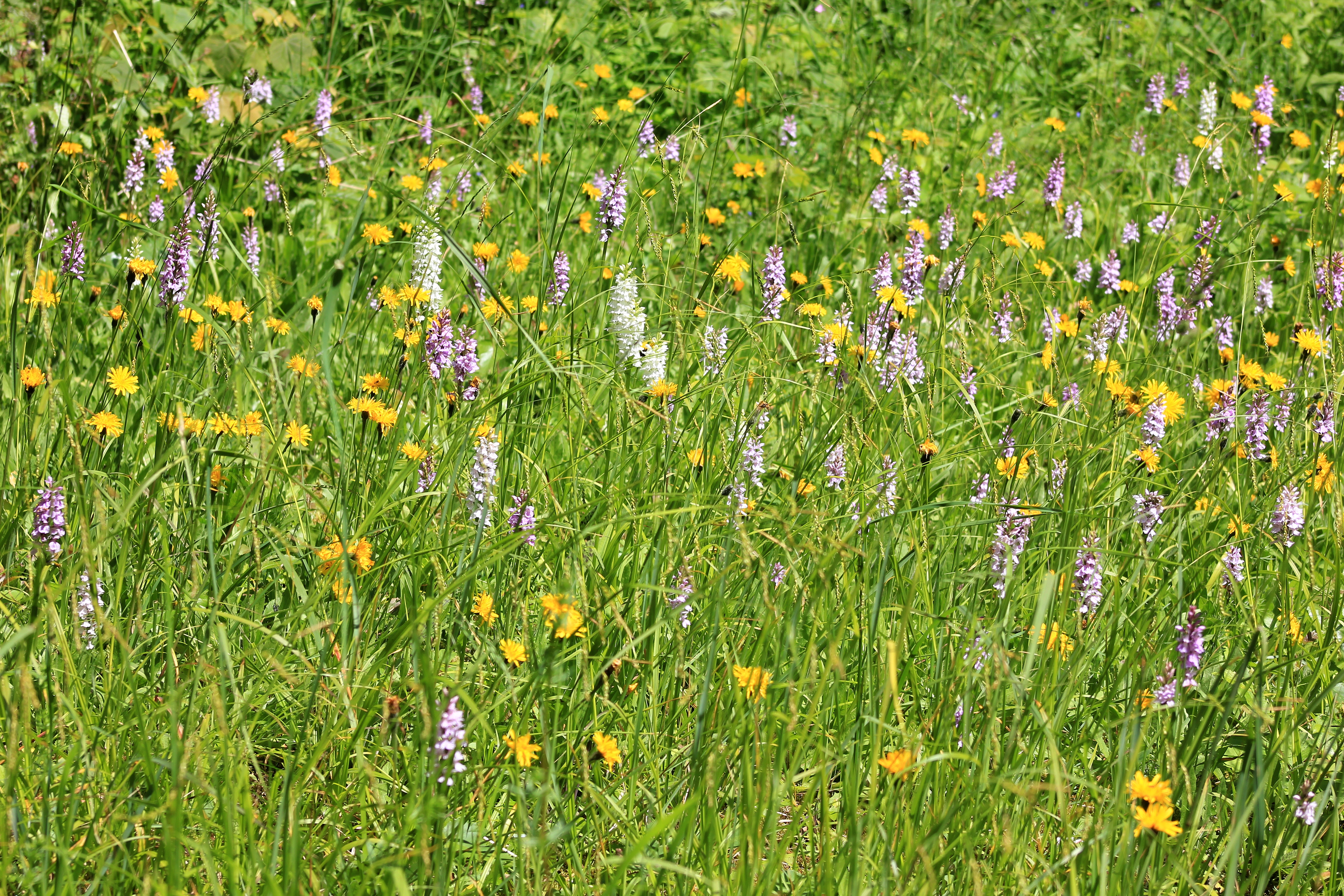 Orchideenwiese. Flora-Fauna-Habitat Kalkwerk Lengefeld. Erzgebirge.Pockau-Lengefeld (OT Lengefeld).